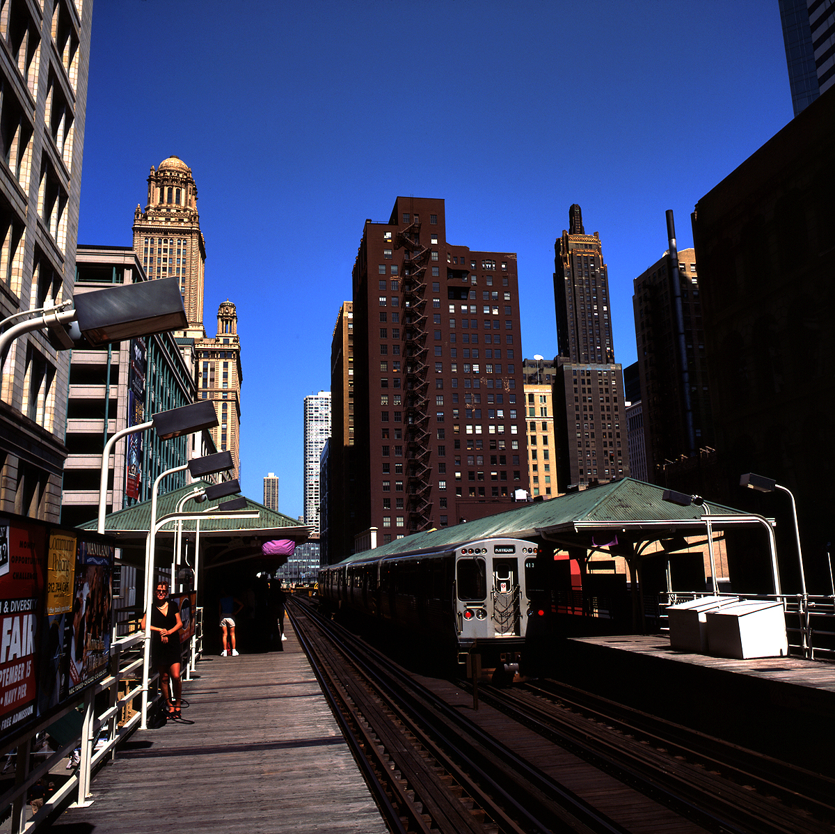 Opname van de Loop, Randolph-Station, op Wabash Av., Chicago. Zelfgescande dia van eigen materiaal.